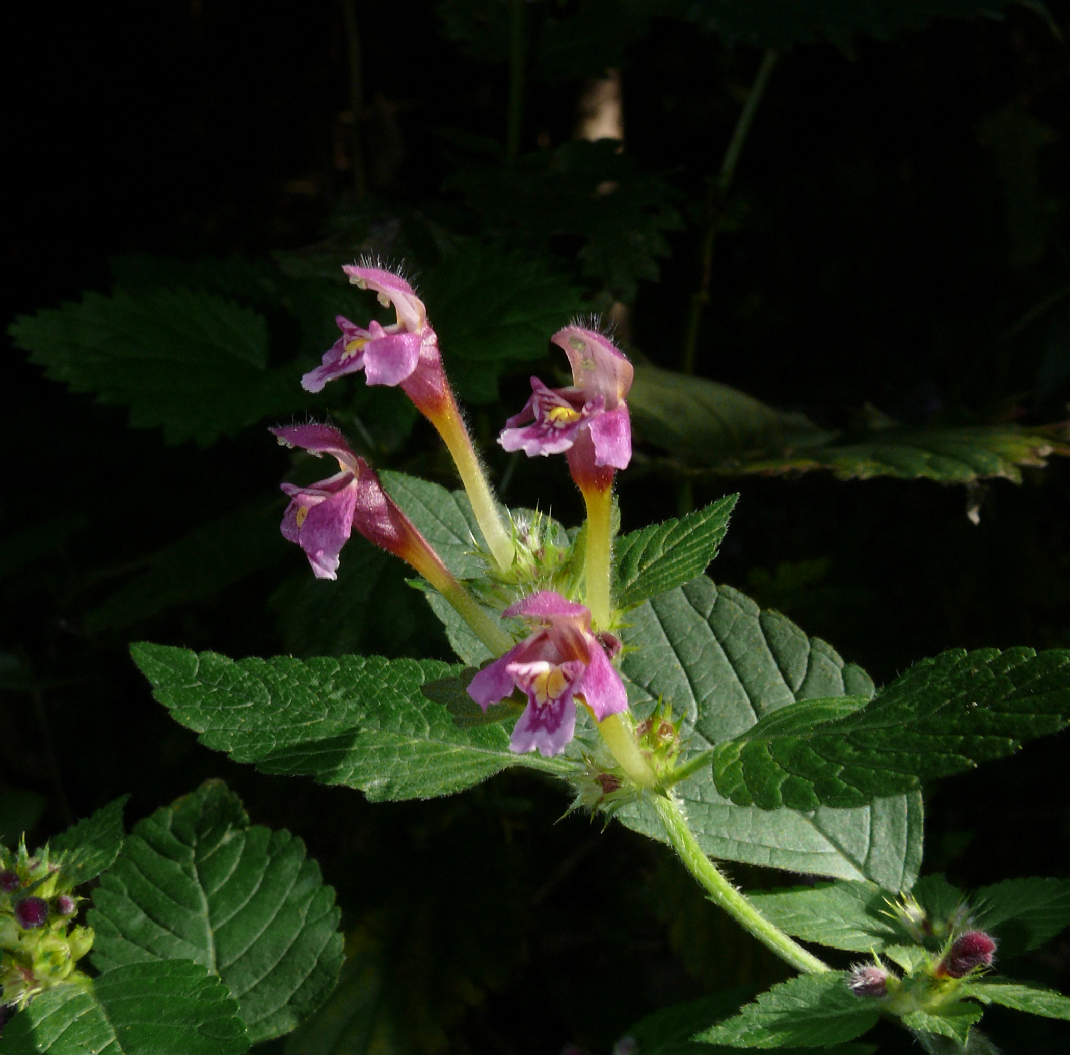 Galeopsis pubescens, Schwäbisch-Fränkische Waldberge, Deutschland